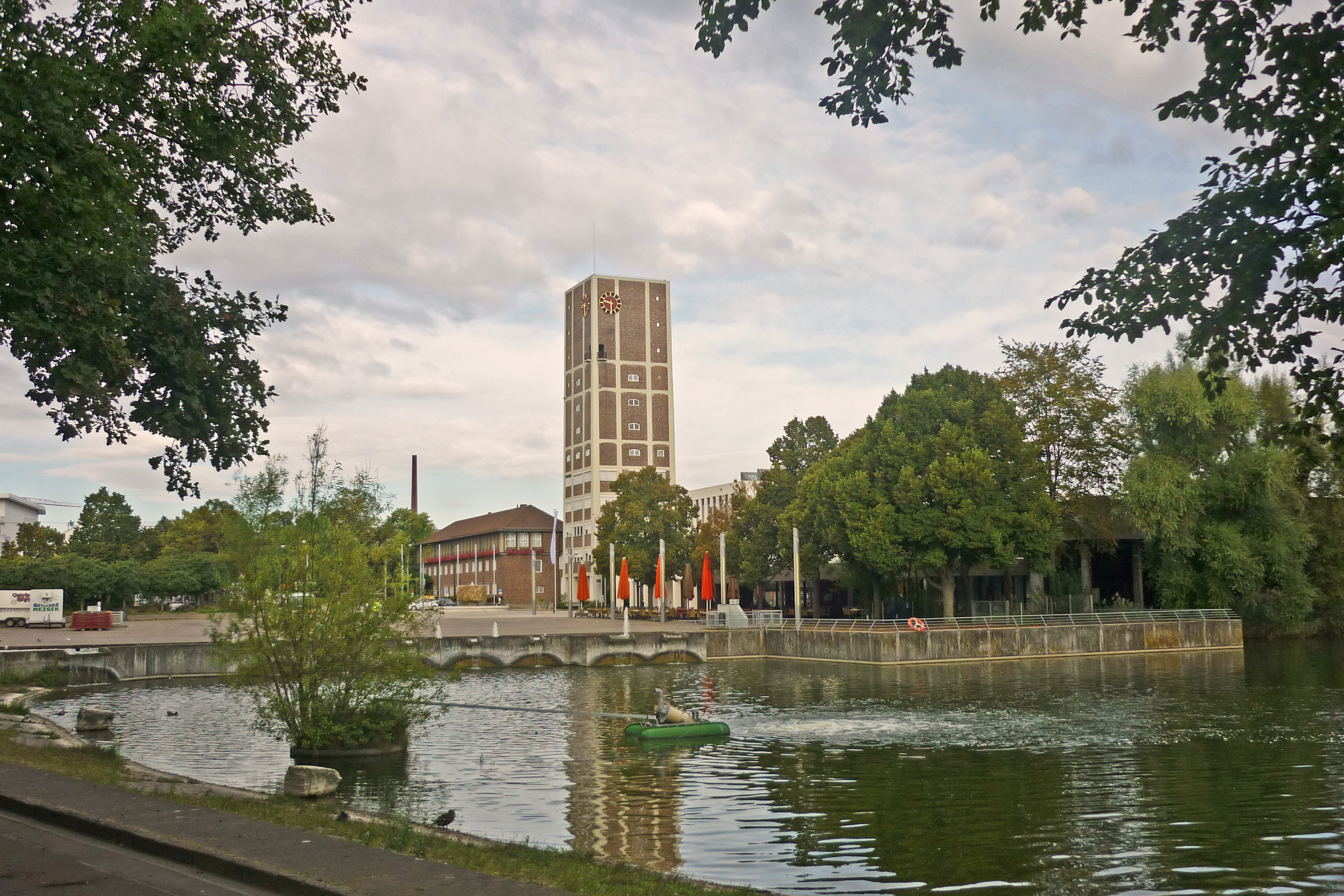 Salamander-Stadtpark in Kornwestheim